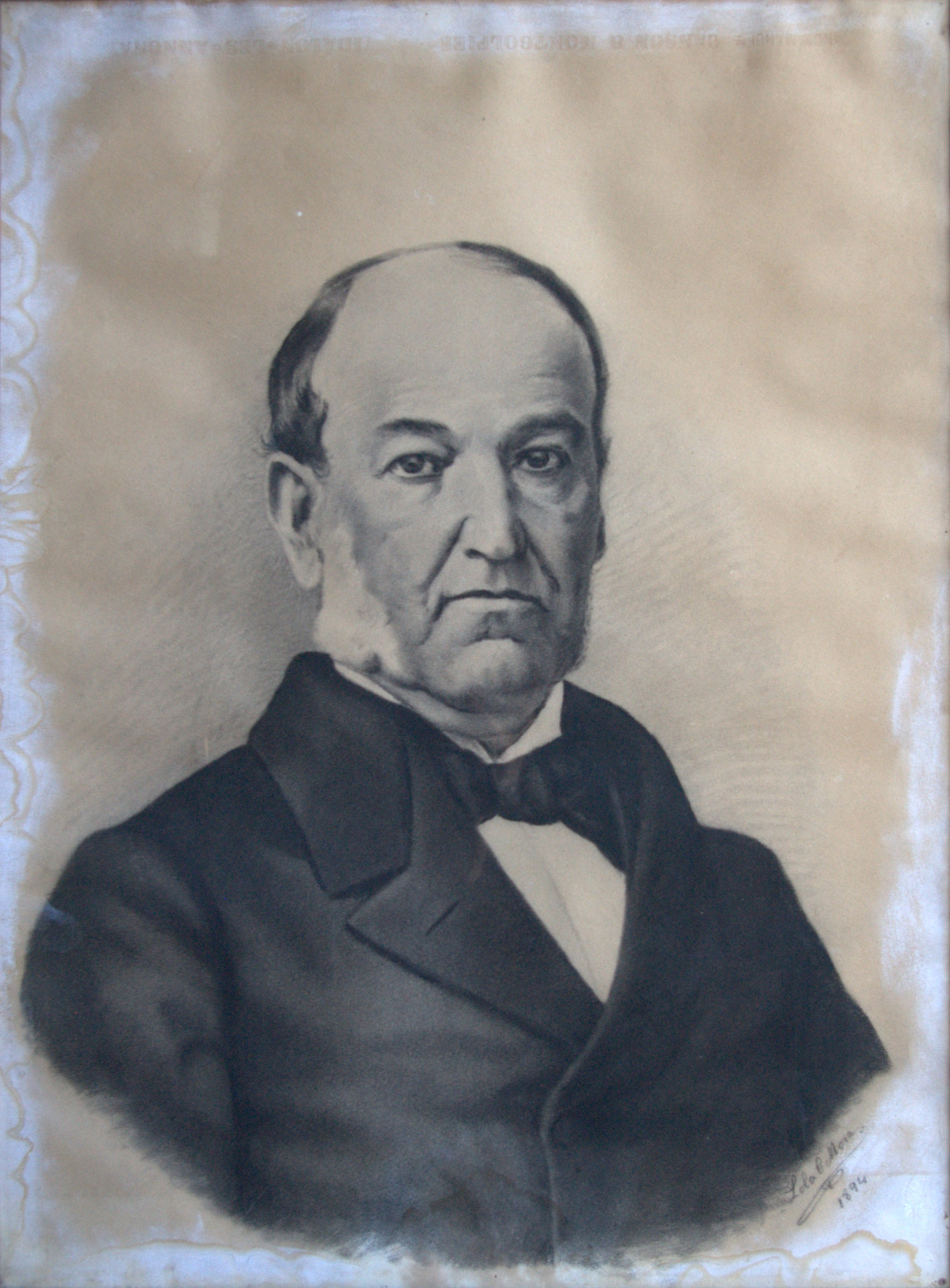 Agustín Justo de la Vega, Gobernador de tucumán